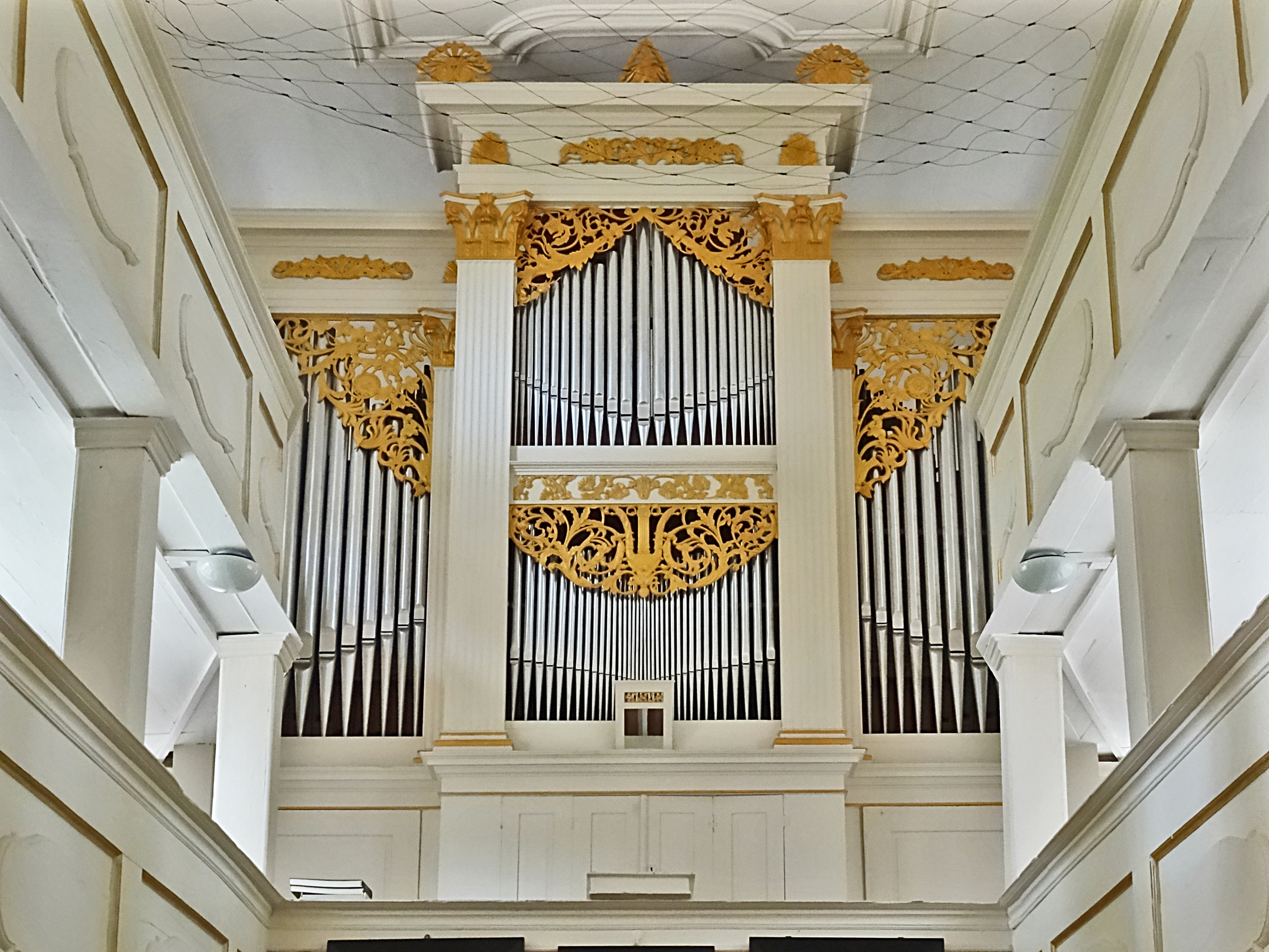 Orgel in der Dorfkirche St. Johannes (Schönewerda) von Carl August & Heinrich Louis Witzmann (1846 IIP/21)